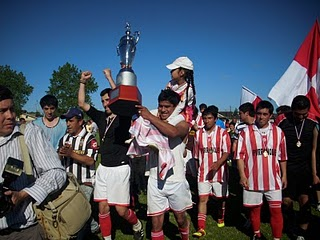 Purranque obteniendo el título Regional el 2010